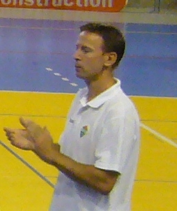 Le joueur puis entraîneur français de basket-ball Vincent Collet (ASVEL, à Agde, 34)